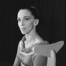 מתוך היצירה "הורודיה", 1965; כוריאוגרפיה: מרתה גרהם (באדיבות להקת מחול בת-שבע)